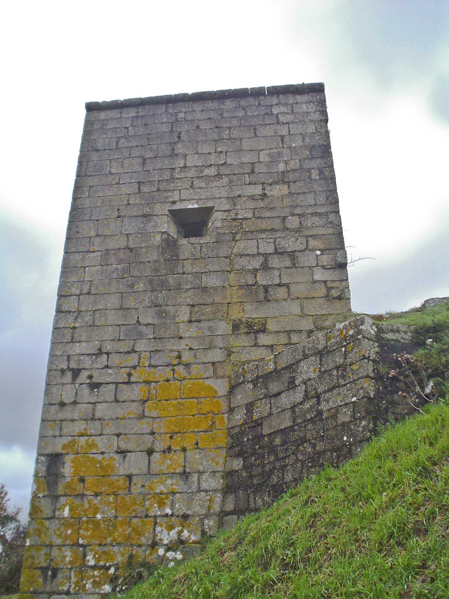 Torres de Altamira. Detalle dunha delas